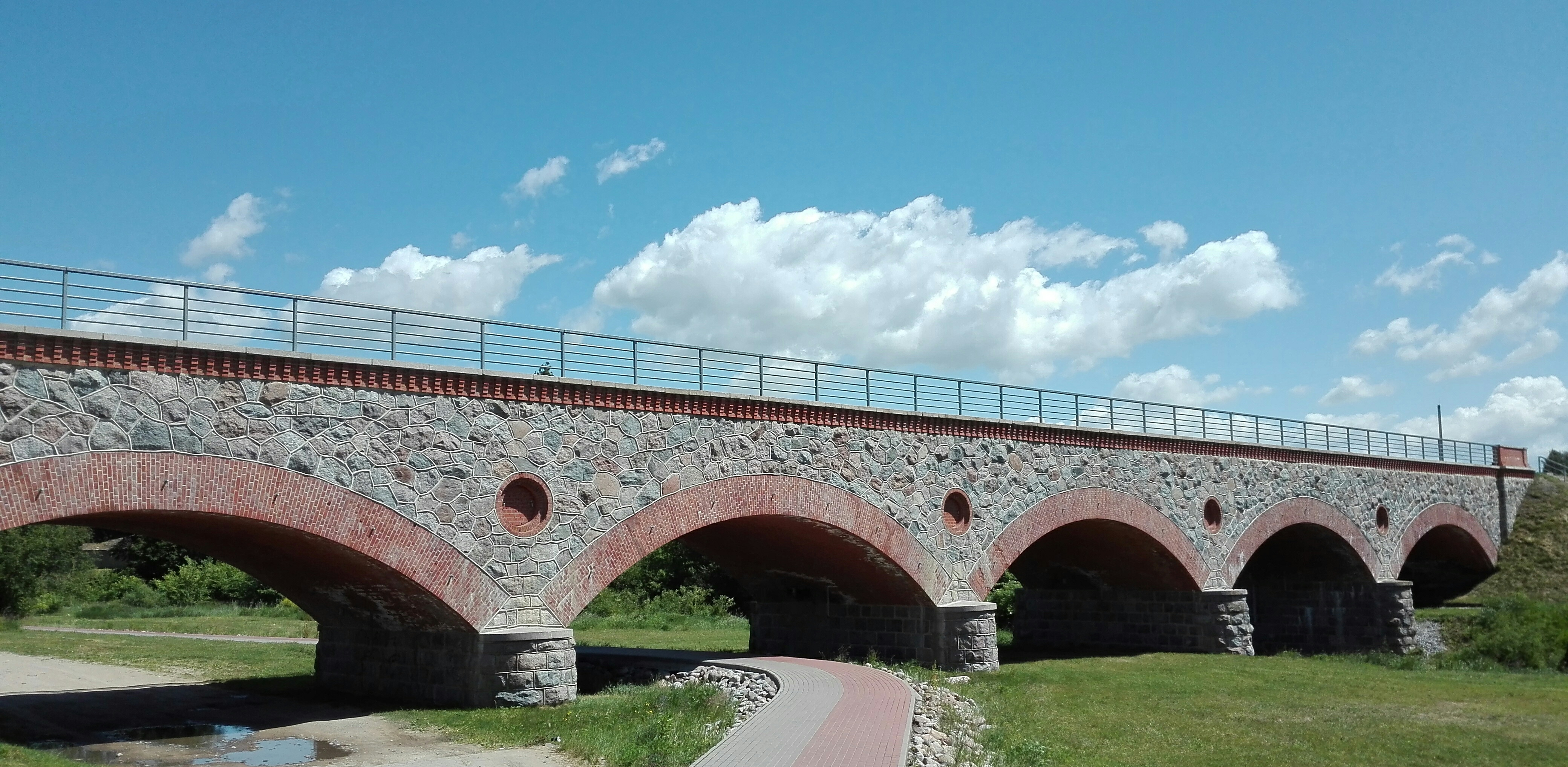 Šilutės geležinkelio tiltas